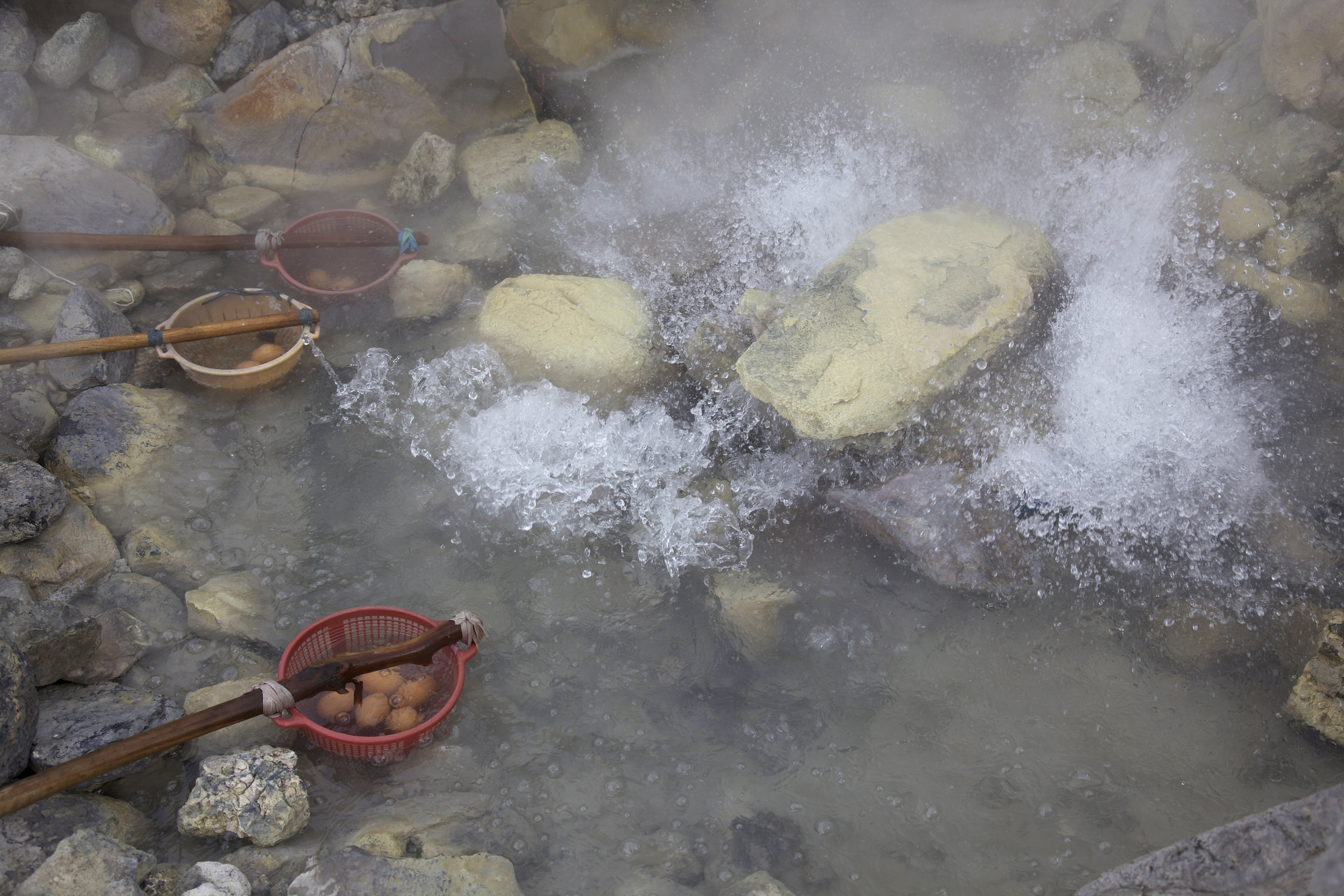 Other Tangkuban Perahu pictures.